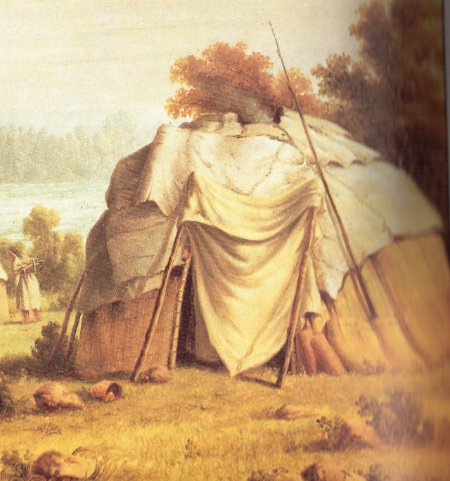 detail: Ojibwa wigwam.